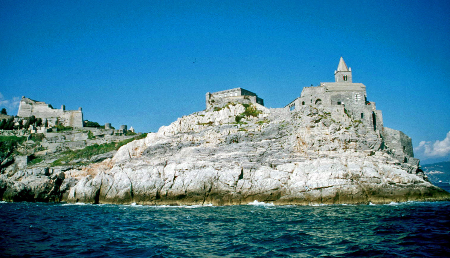 Porto Venere 2004